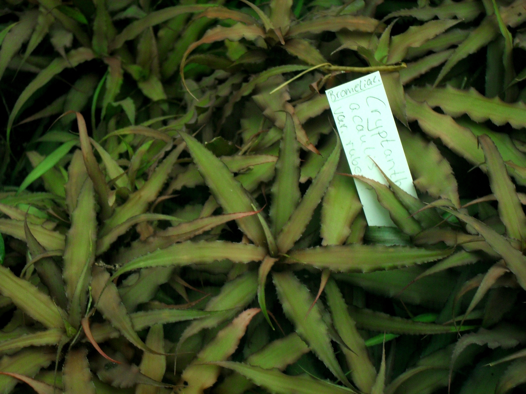 Cryptanthus acaulis - Botanischer Garten Leipzig